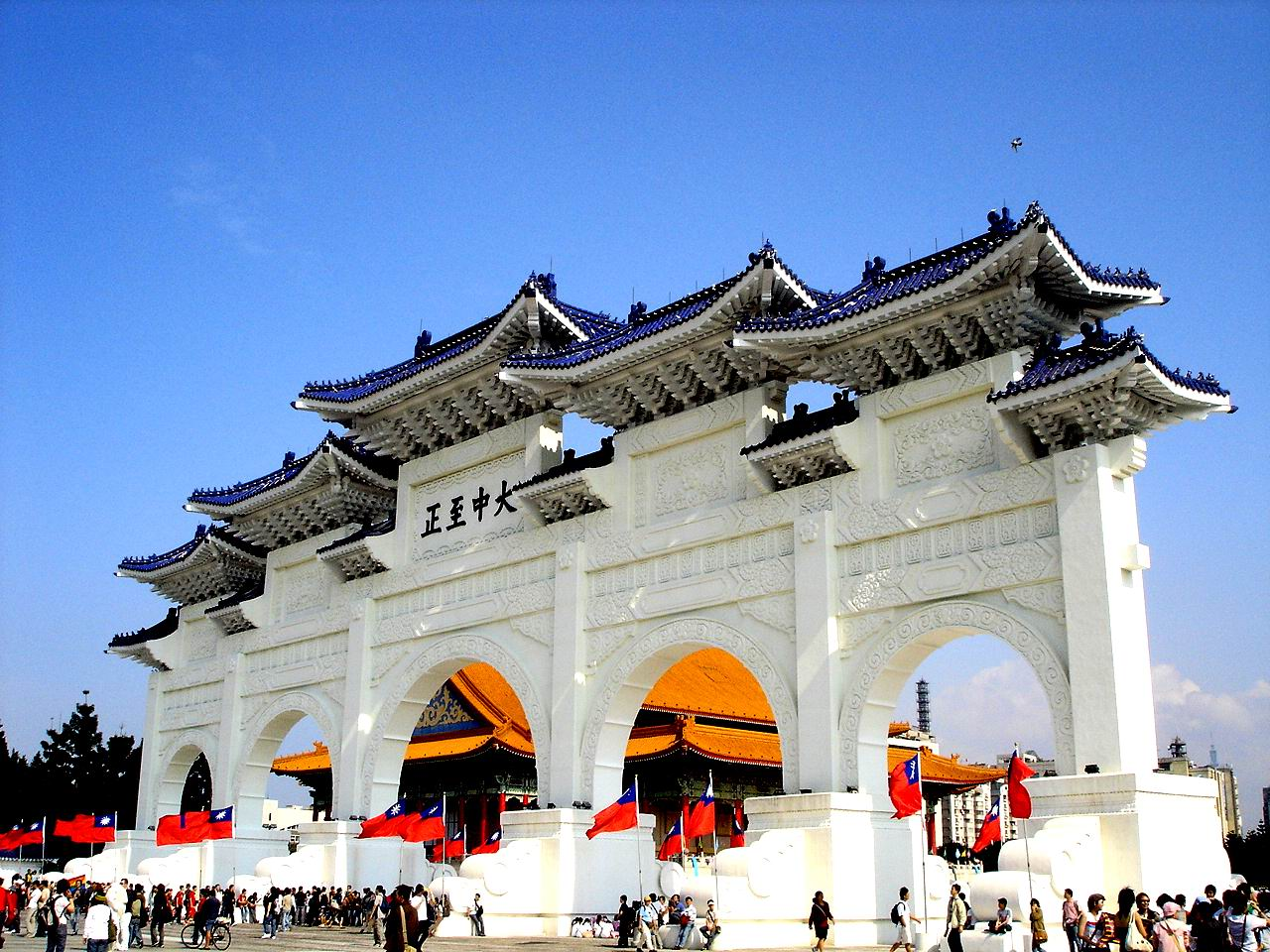 中華民國國旗飄揚的中正紀念堂大中至正門，後方建築為國家音樂廳。